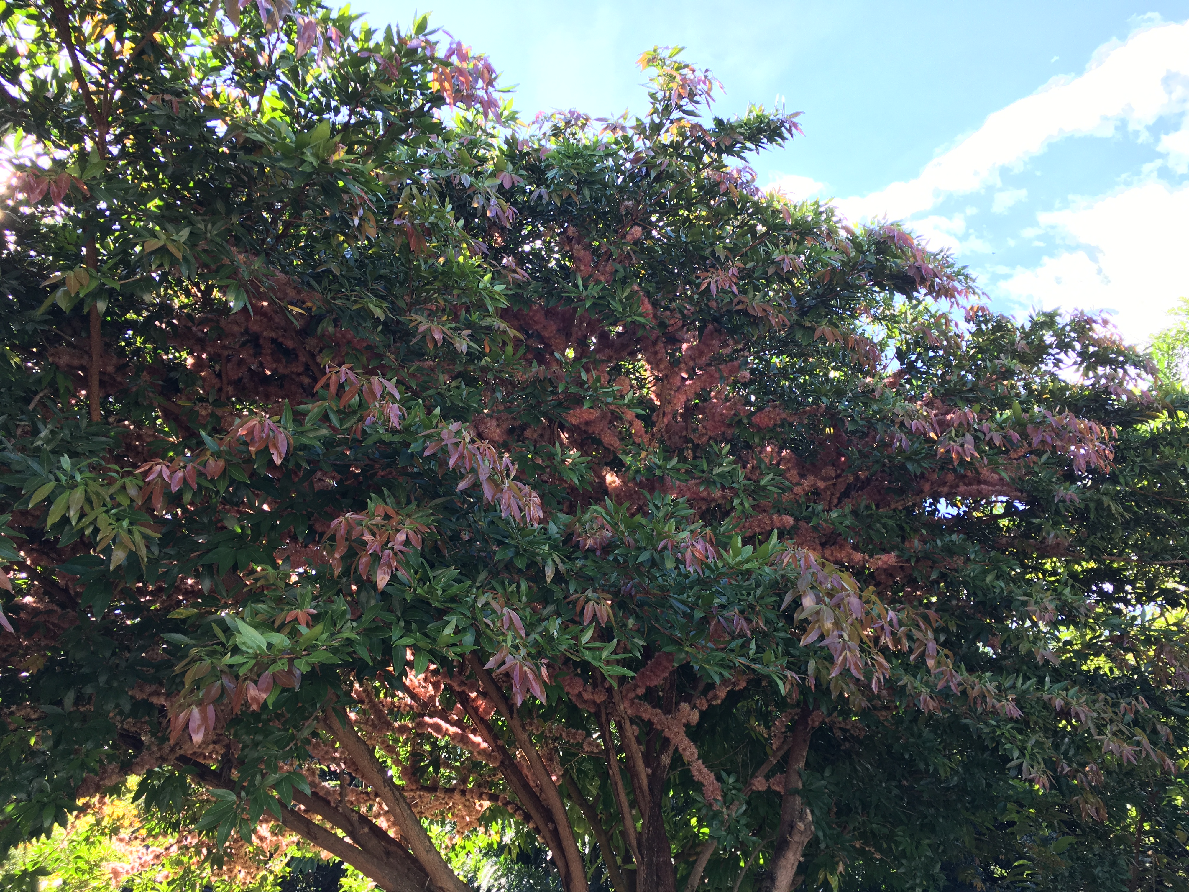 Zygia longifolia, conocido como sotacaballo en Costa Rica, en floración. Tres Ríos (Provincia de Cartago), Costa Rica.